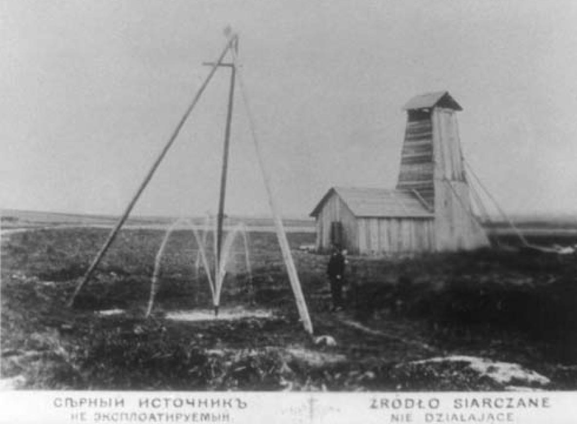 Busko, ujęcia wody wykonane przez Aleksandra Michalskiego - ujęcie nr 3 i wiertnia ujęcia nr 4, na drugim planie. Fotografia z 1894 r. S. Rachalewskiego (zbiory Muzeum Narodowego w Kielcach)